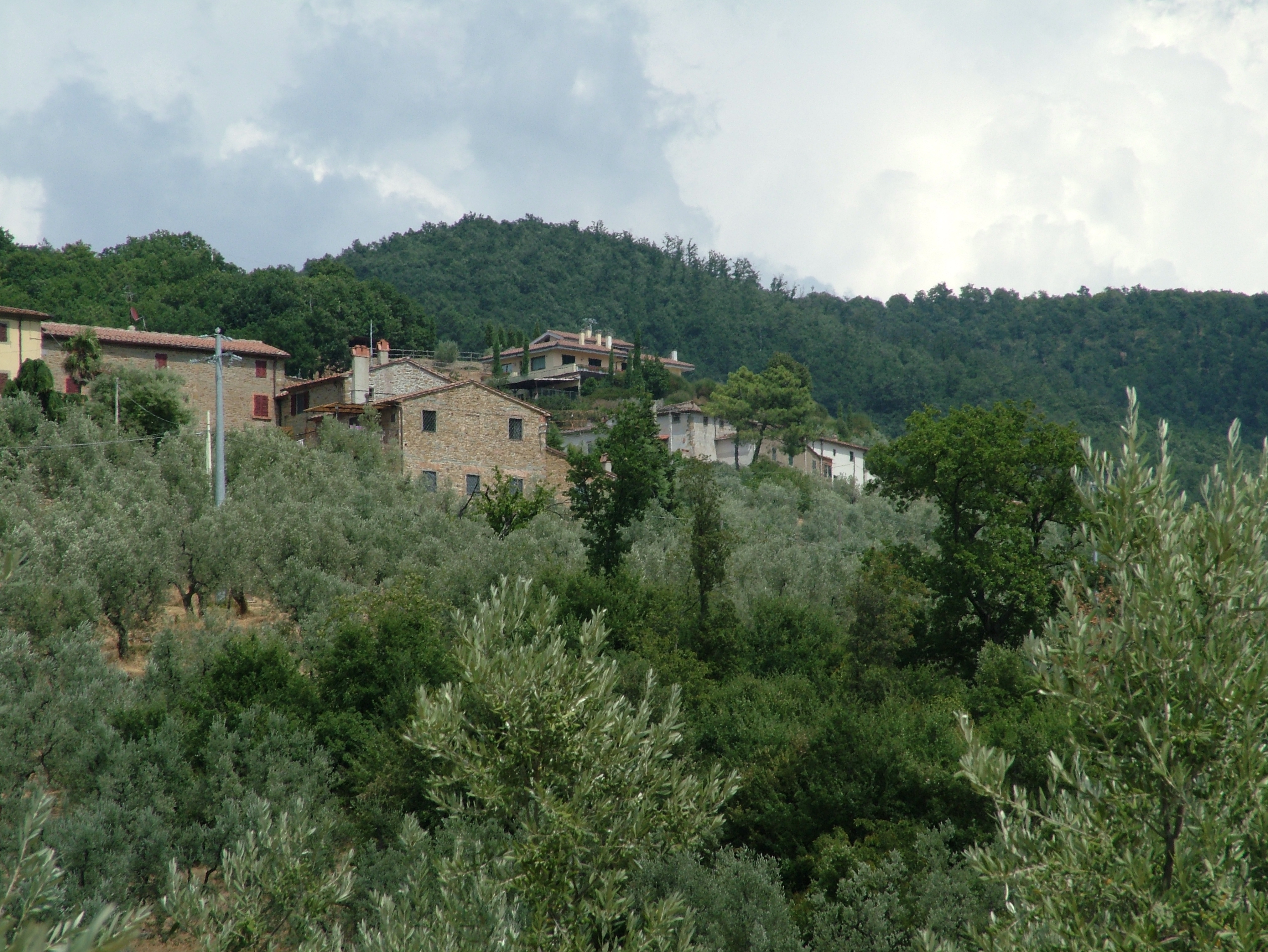 Vinci, Toscana, Italia